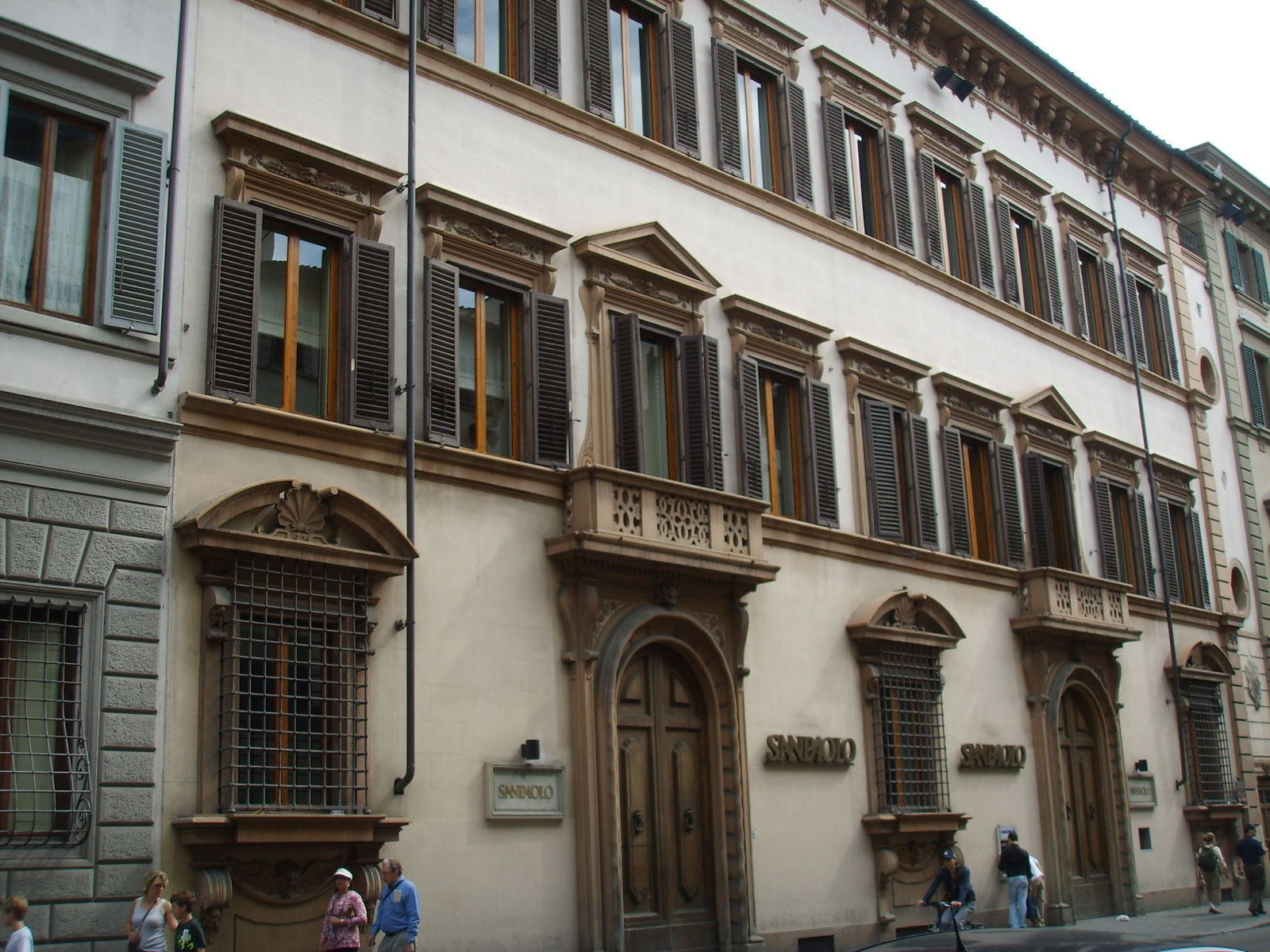 Palazzo_Bartolommei florence italy